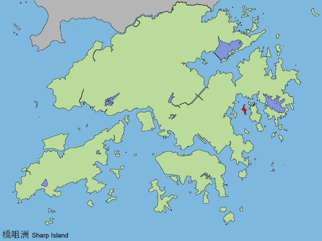 中文（香港）: 橋咀洲。